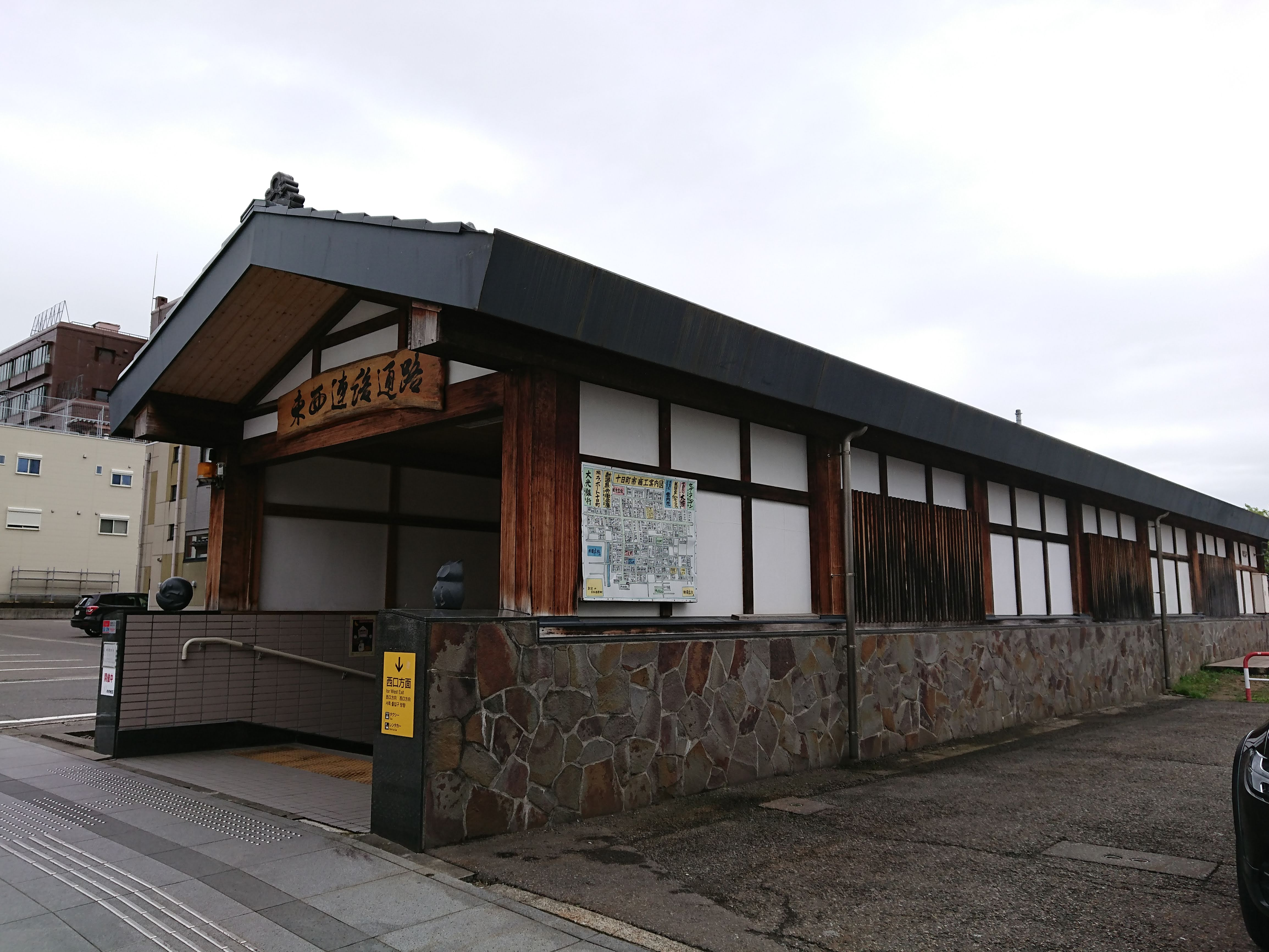 十日町駅の地下連絡通路